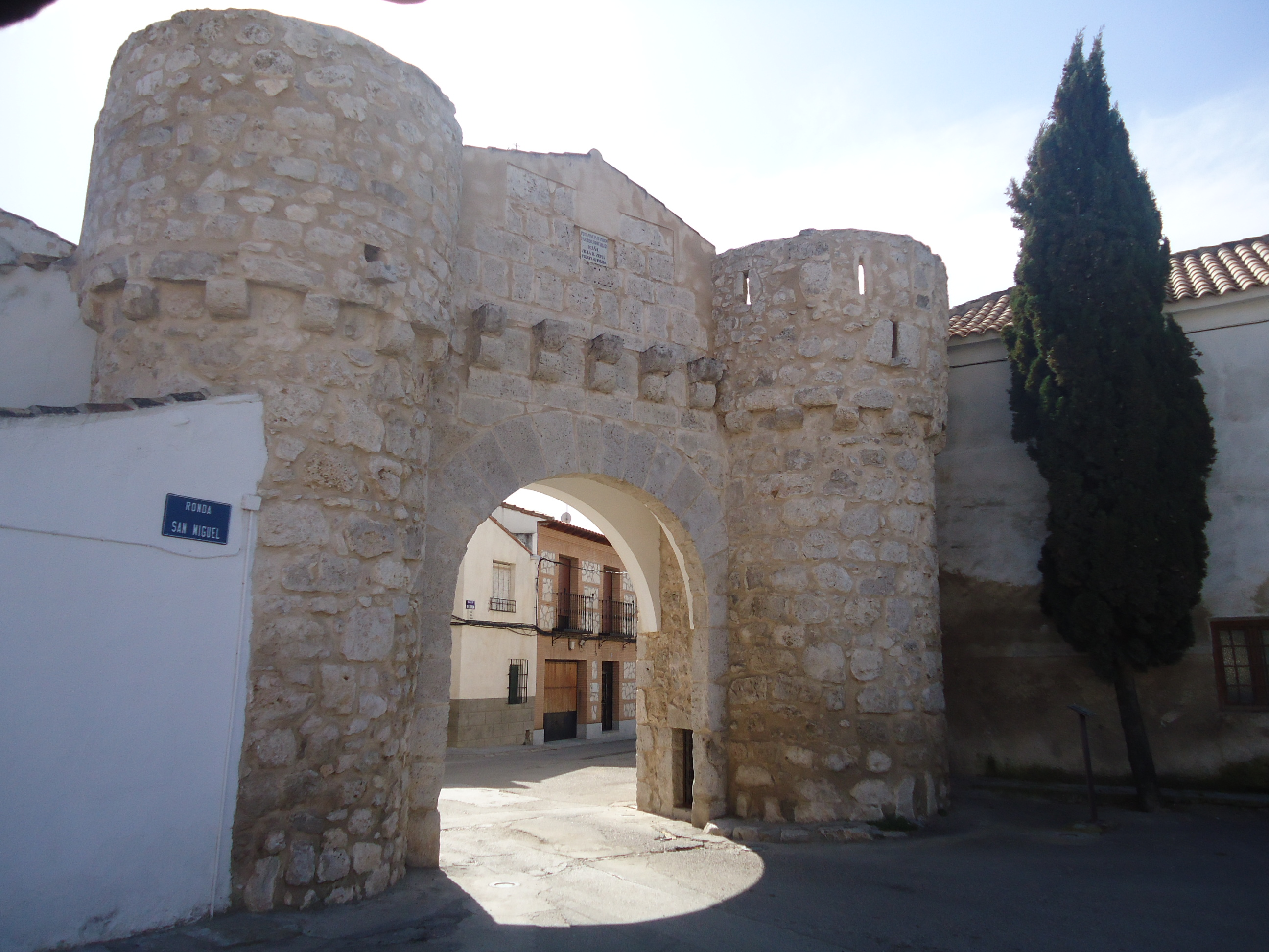 Puerta de Toledo en Yepes (Toledo)